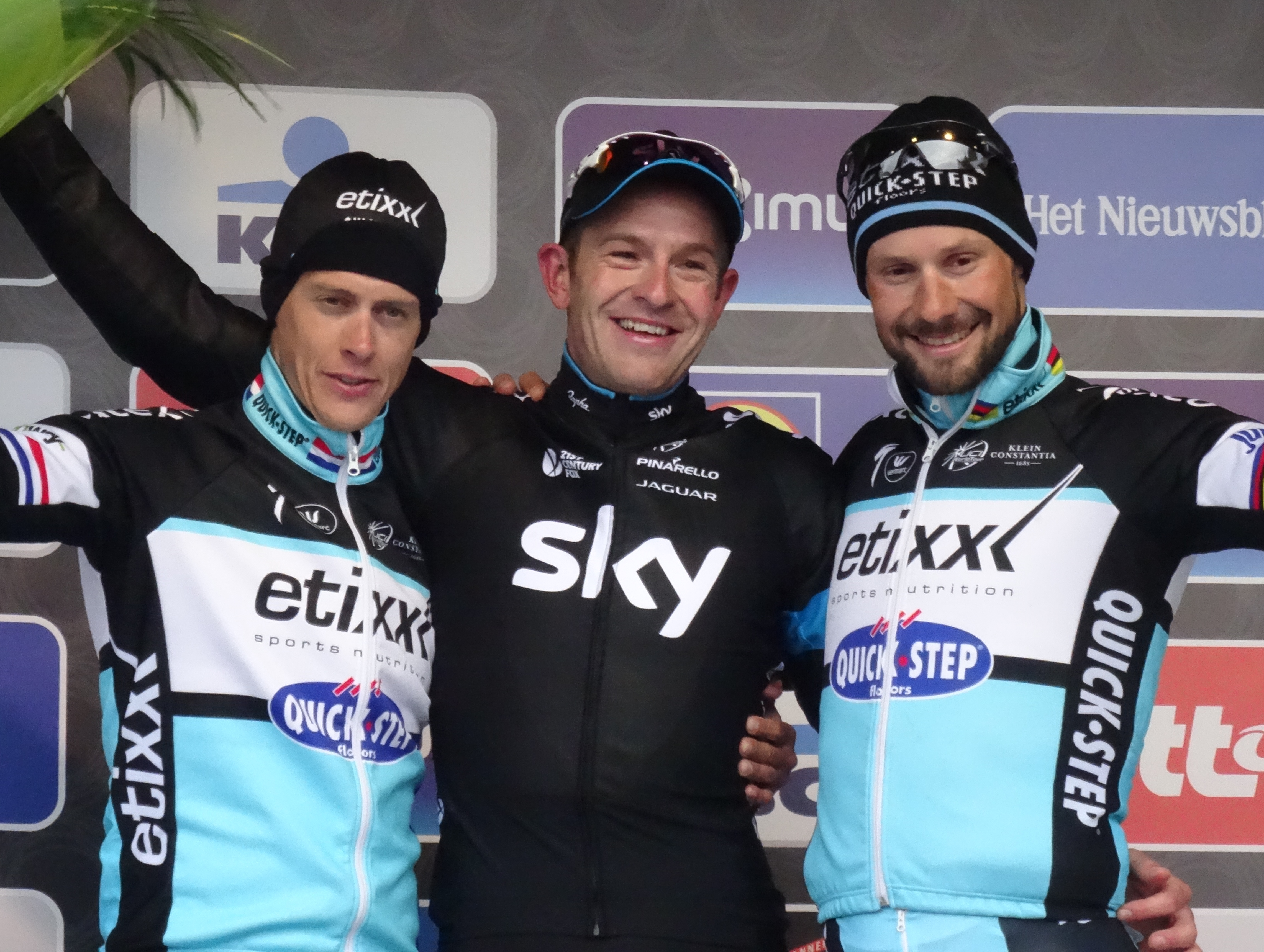 Reportage réalisé le samedi 28 février à l'occasion du départ et de l'arrivée du Circuit Het Nieuwsblad 2015 à Gand, Belgique.